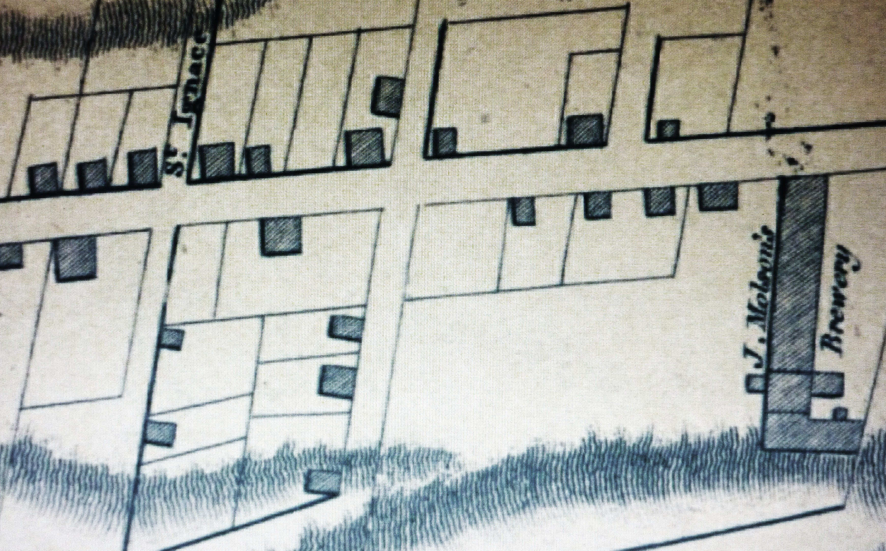 Document BANQ / Montreal Map: Joseph Bouchette, (1774-1841). Le détail de cette carte nous montre les installations de l'industriel John Molson dans le secteur Est de l'ancien faubourg Québec dans le premier quart du XIXè siècle.